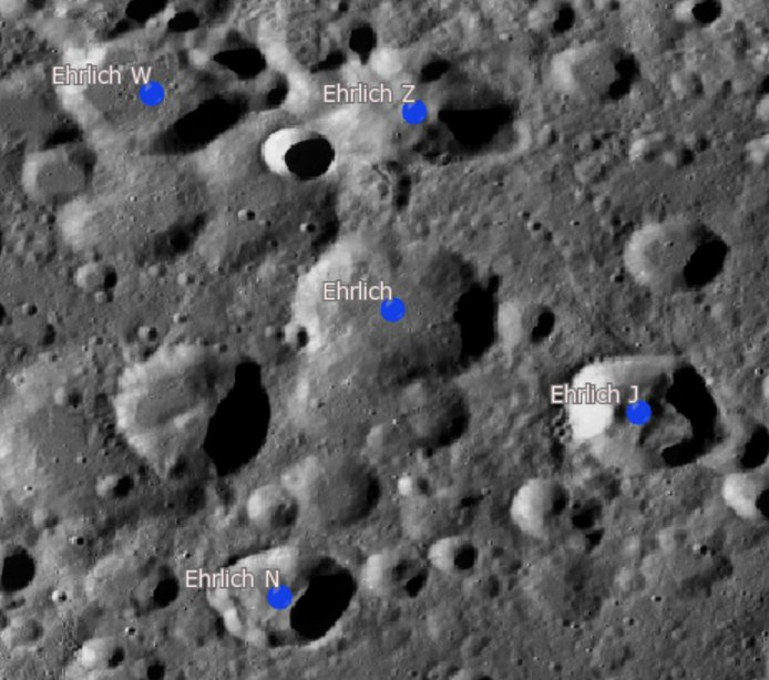 Cráter lunar Ehrlich. Cráteres satélite (Imagen LRO)